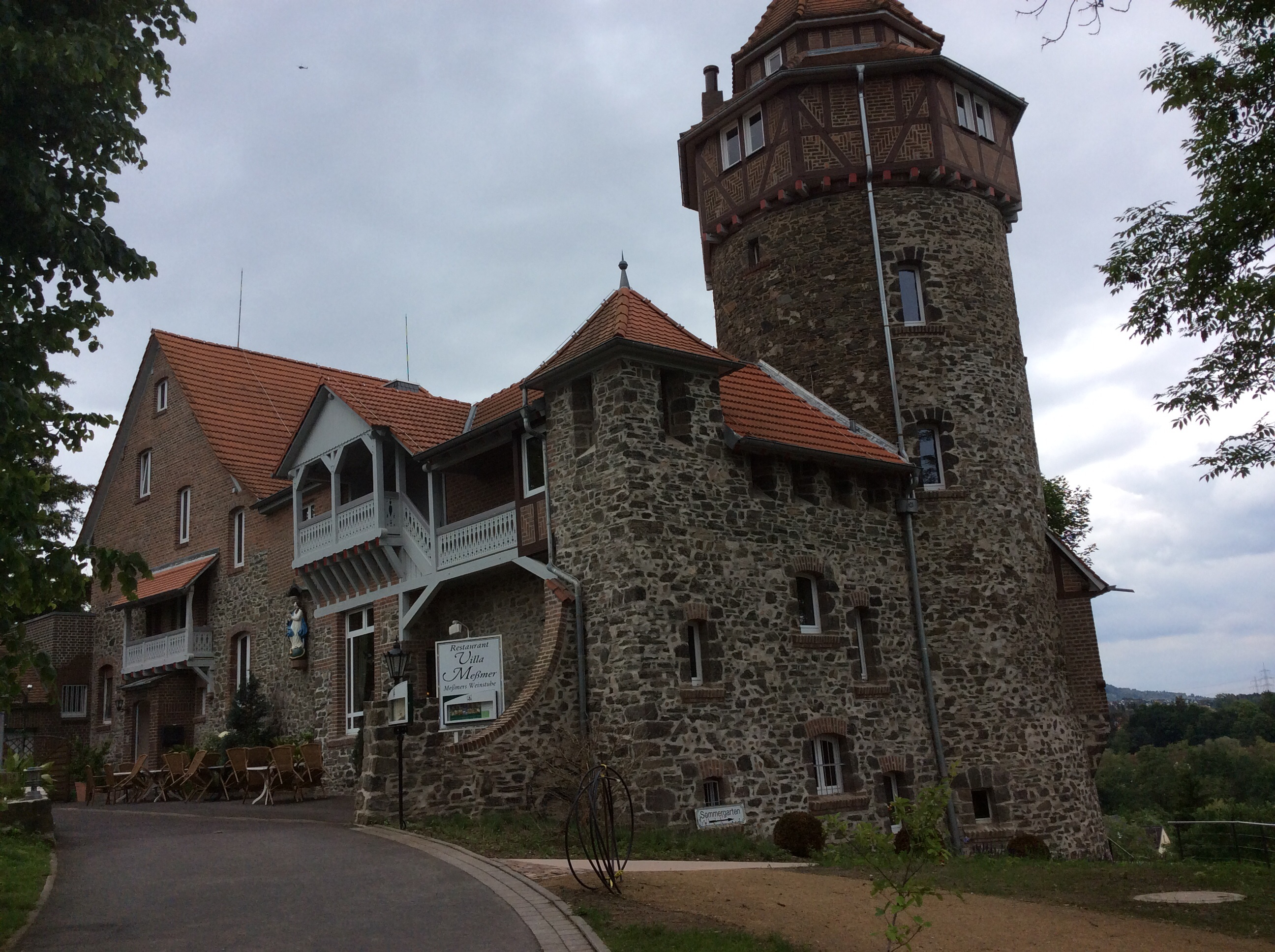 Außenansicht der Villa Meßmer in Alzenau